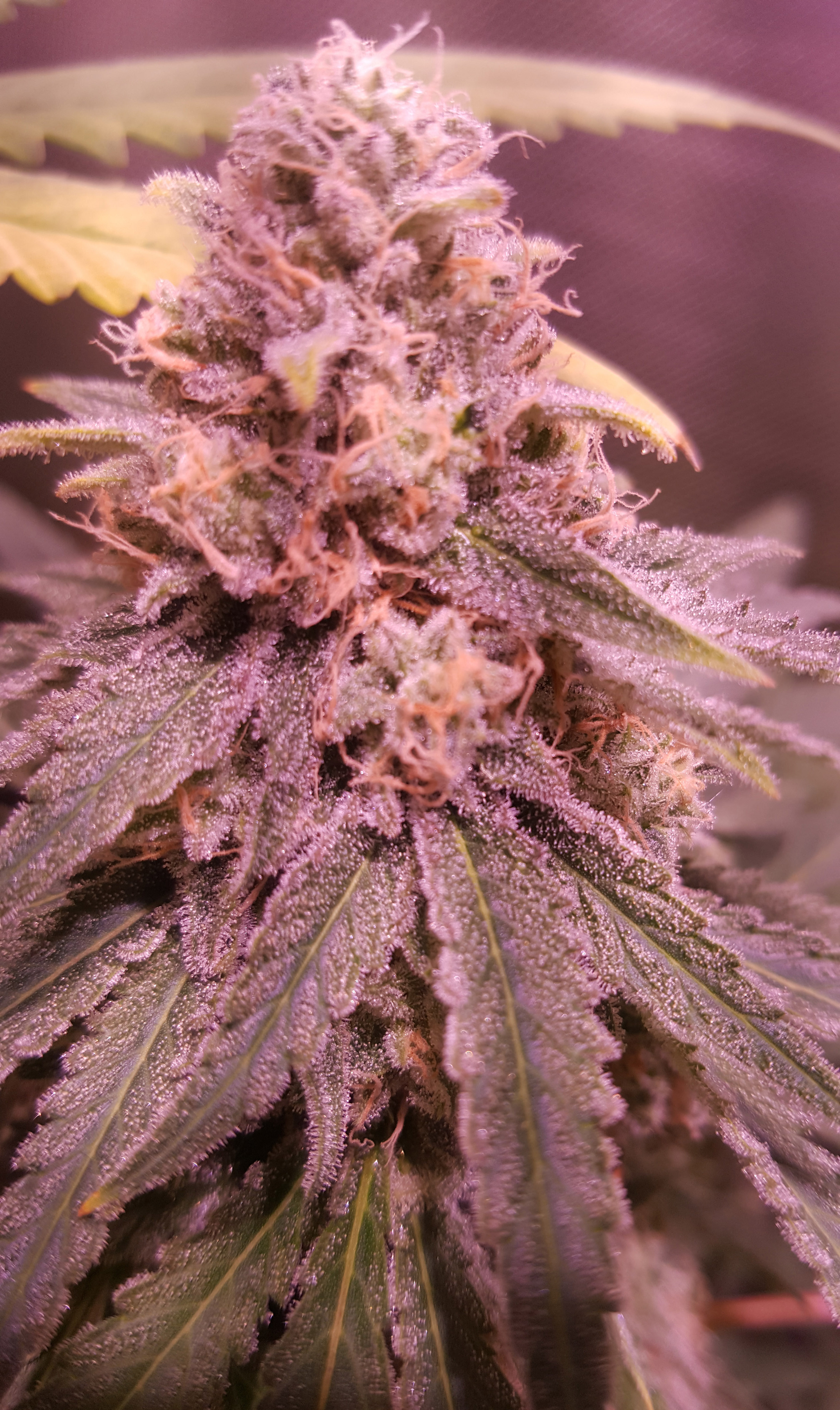 Cogollo de marihuana en floración. Estado transparente, previo a cosecha. Semilla Critical. Cannabis índica